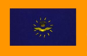 De C-LSK voert de onderscheidingsvlag als vastgesteld bij MB van 4 juni 1955, nummer 200.518B. Het is een kobaltblauwe vlag met een oranje rand ter breedte van 1/6e van de hoogte van de vlag; in het midden de gekroonde luchtmachtadelaar omgeven door een flikkerende zon, alles geborduurd in gouddraad.